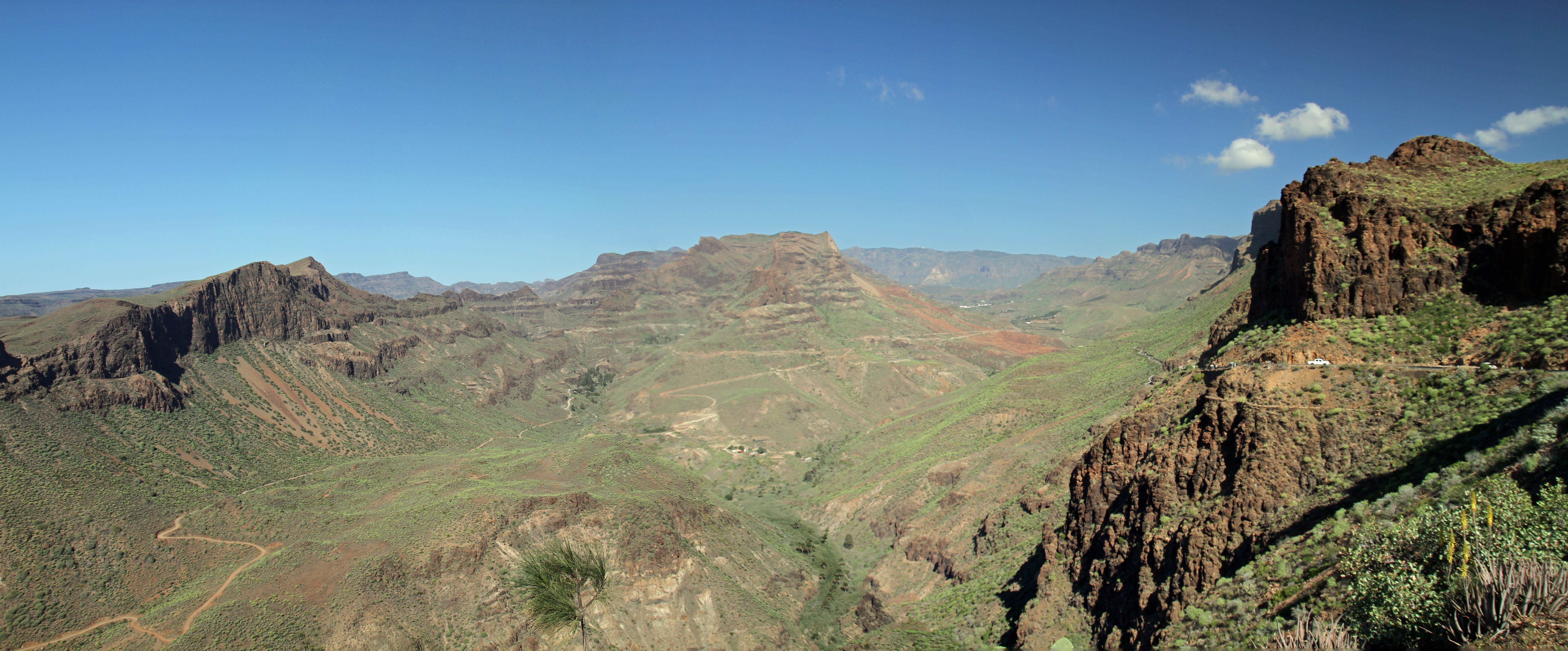 о. Гран-Канария (ландшафт острова)